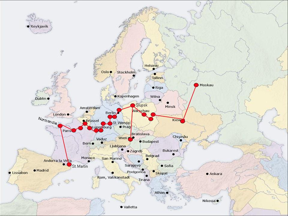 Skizze "Straße des Friedens" nach Otto Freundlich